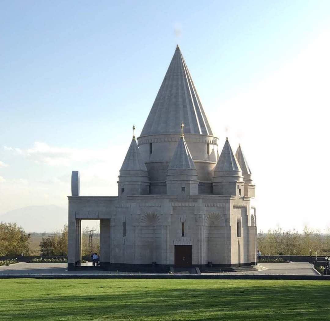 Bildo pri la plej granda templo de la jezidoj en Armenio